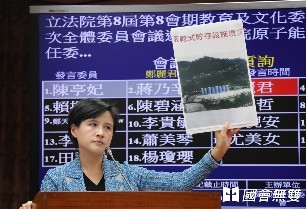 中文（台灣）: 針對台電於核一、核二廠內設置戶外乾式貯存場，民進黨立委鄭麗君質疑，原能會未依國際最高安全標準對台電進行審查。